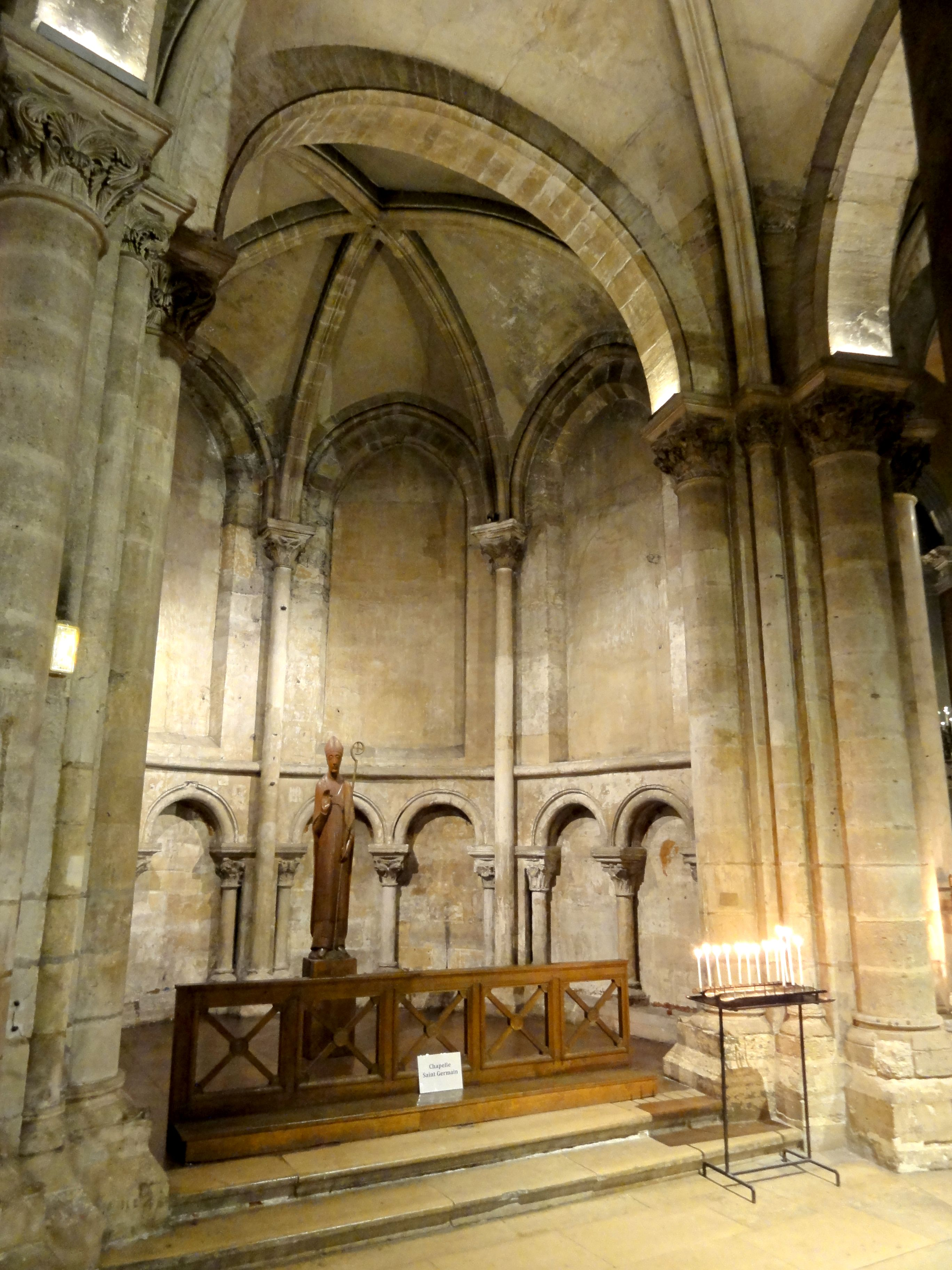 Chapelle St-Germain (seconde chapelle rayonnante au nord du déambulatoire).